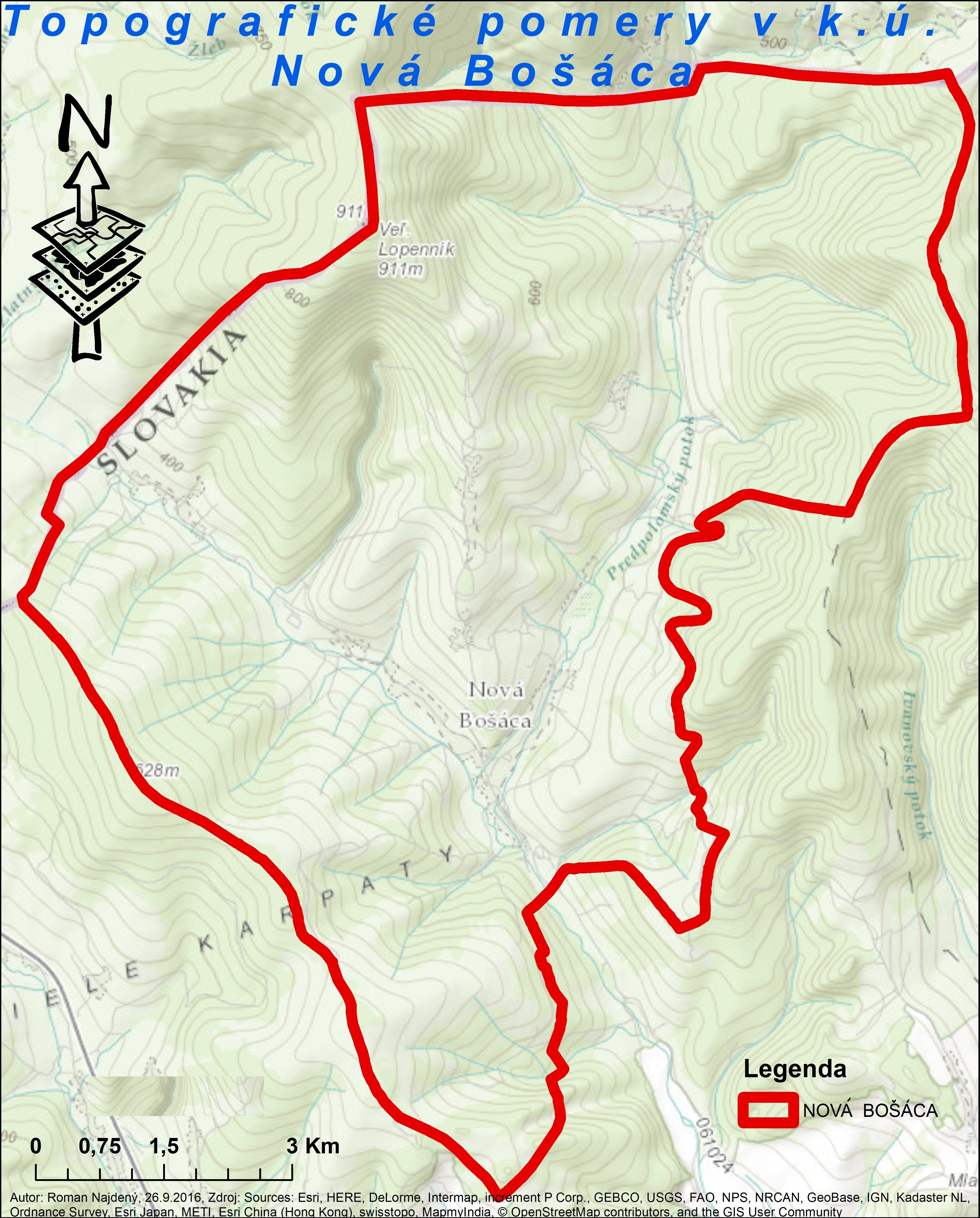 Topografické pomery v k.ú. Nová Bošáca